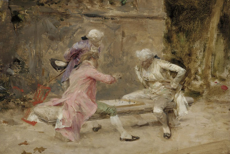 Charles Bargue. Le jeu d'échecs. Частное собрание